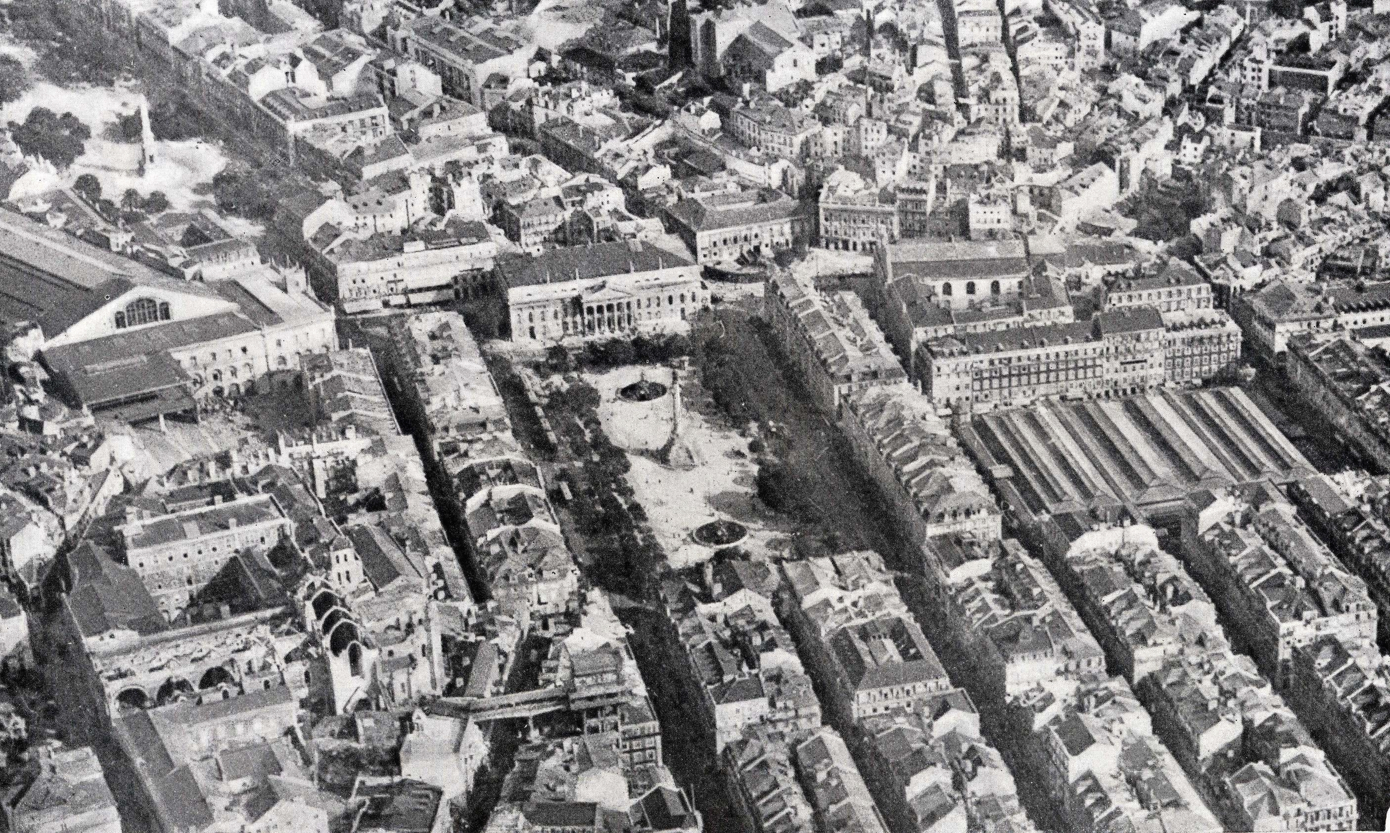 Vista aérea de Lisboa em 1919: foto de Serra Ribeiro tirada para a revista Ilustração Portuguesa